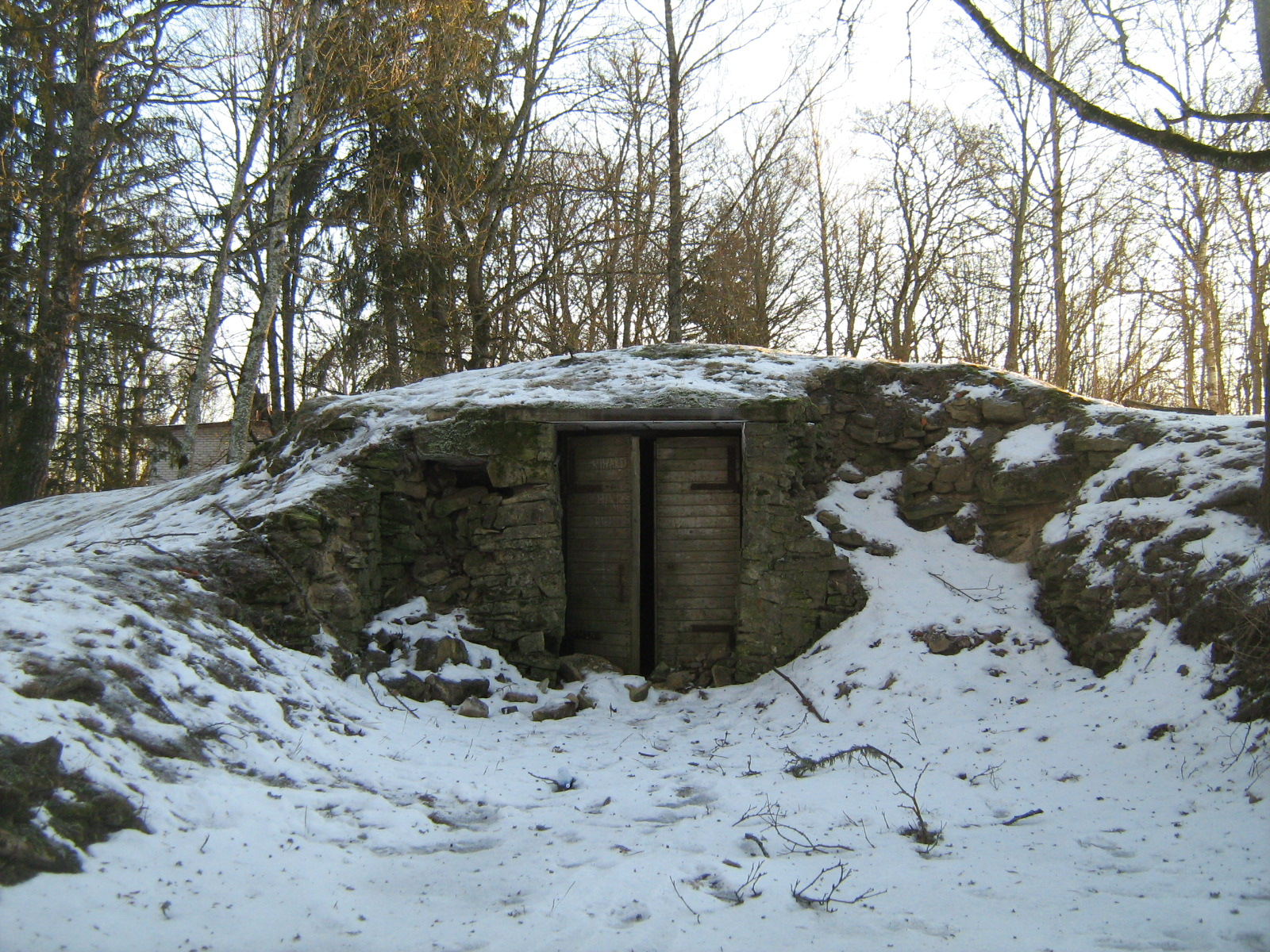 Kuimetsa linnuse keldri varemed